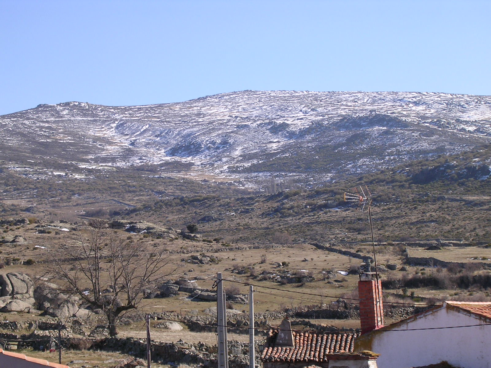 Cerro de Gorría desde Pasarilla del Rebollar